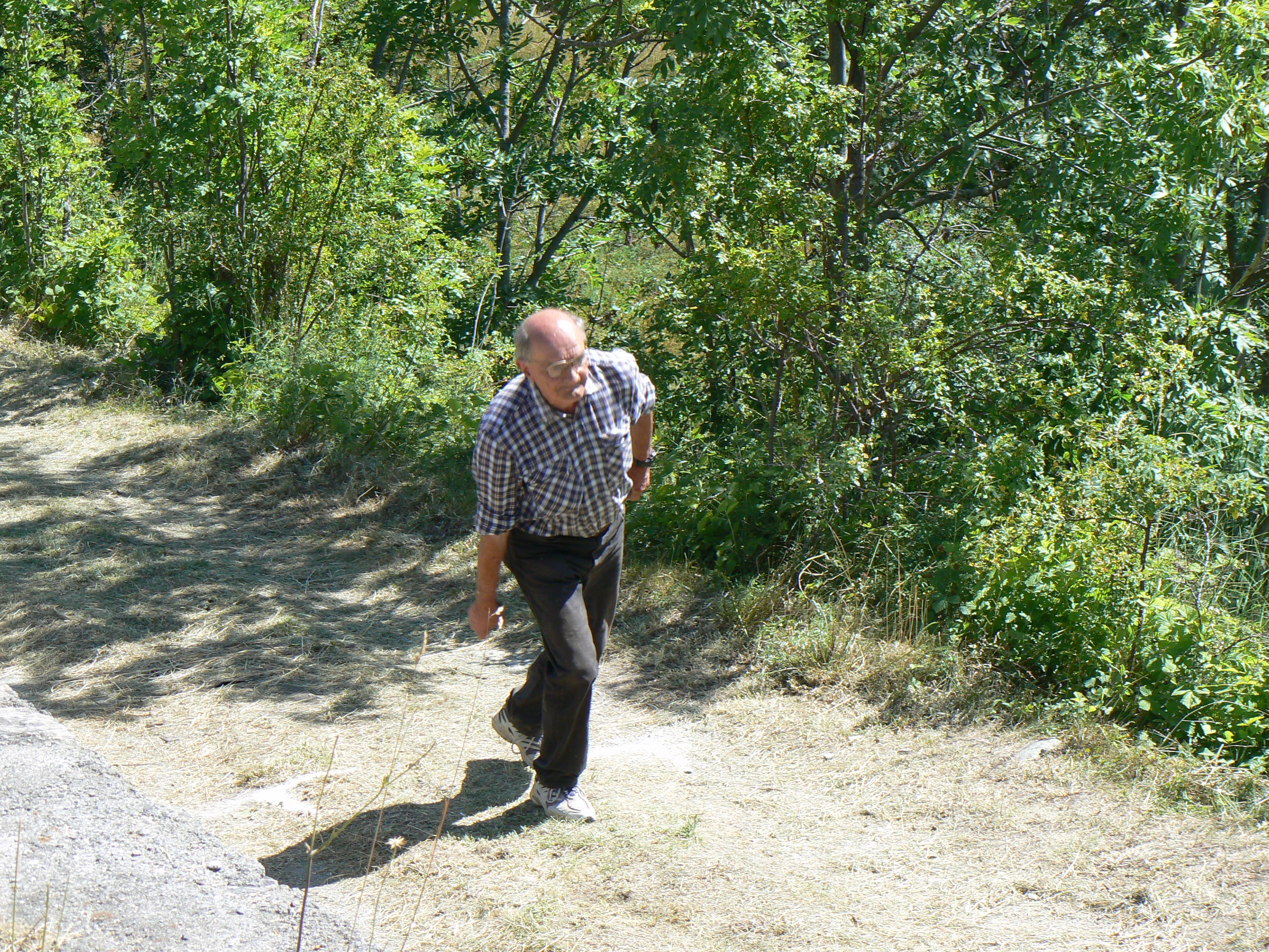 Un giocatore durante il lancio. Partita di palet valdostano "a baraonda" durante la Festa della Favò 2012 nella frazione di Ozein, Aymavilles, Valle d'Aosta, Italia.